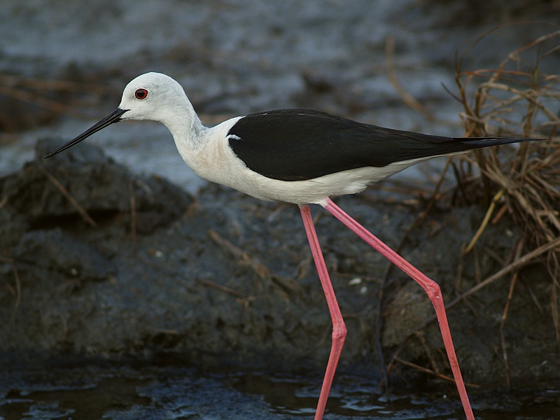 Himantopus himantopus（高蹺鴴．黑翅長腳鷸）, Changhua County, Taiwan, 2008.